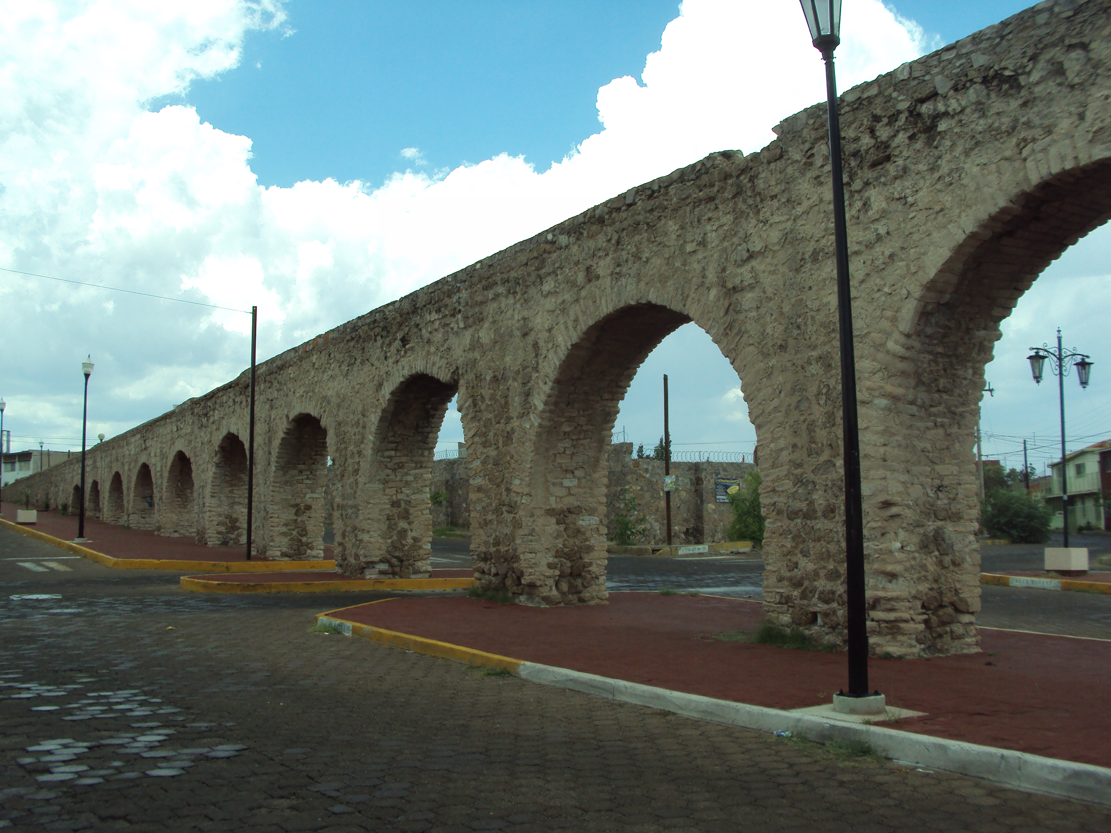 Acueducto de la ciudad de Chihuahua